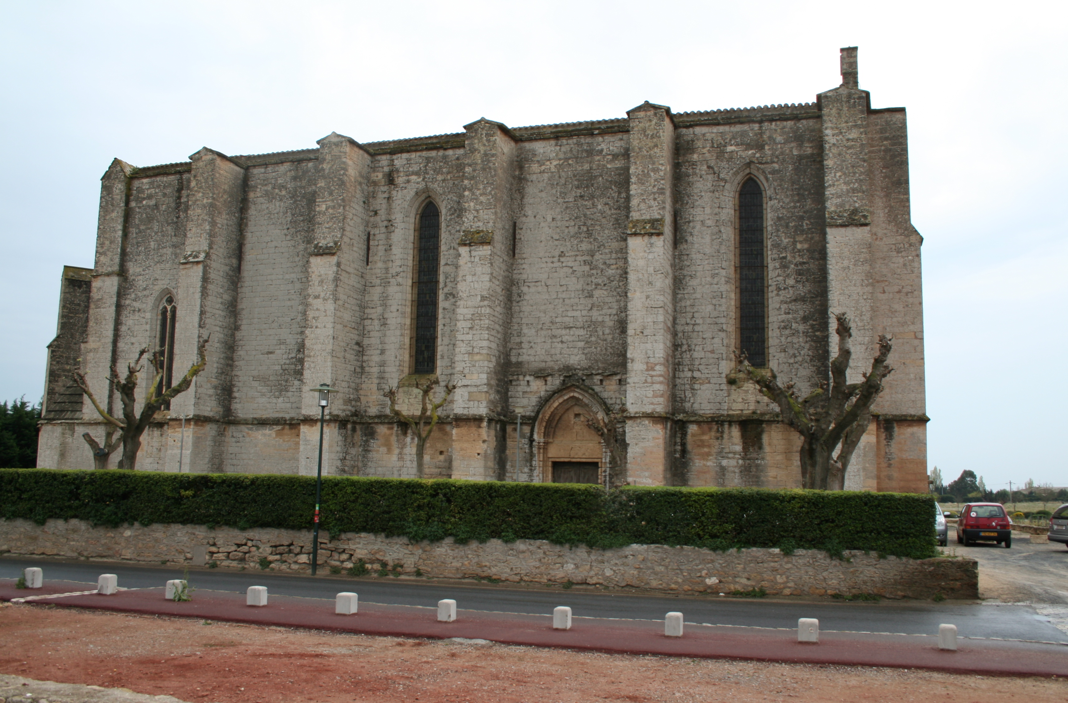 Loupian (Hérault) - église Sainte-Cécile (façade nord et porte des morts). Au premier plan, nef de l'église paléochrétienne.